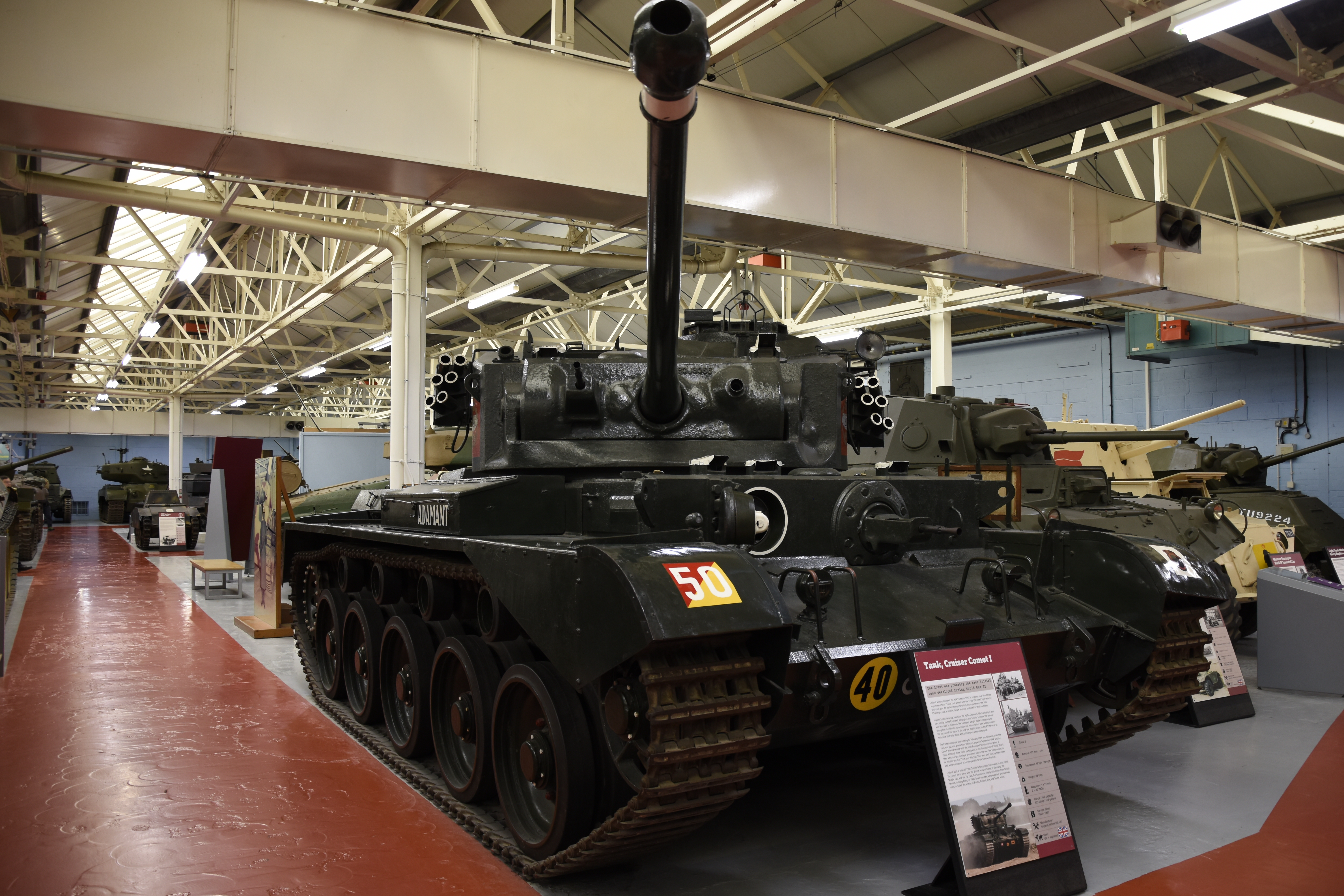 A34 Cruiser Tank Comet- The Tank Museum 19-05-2017